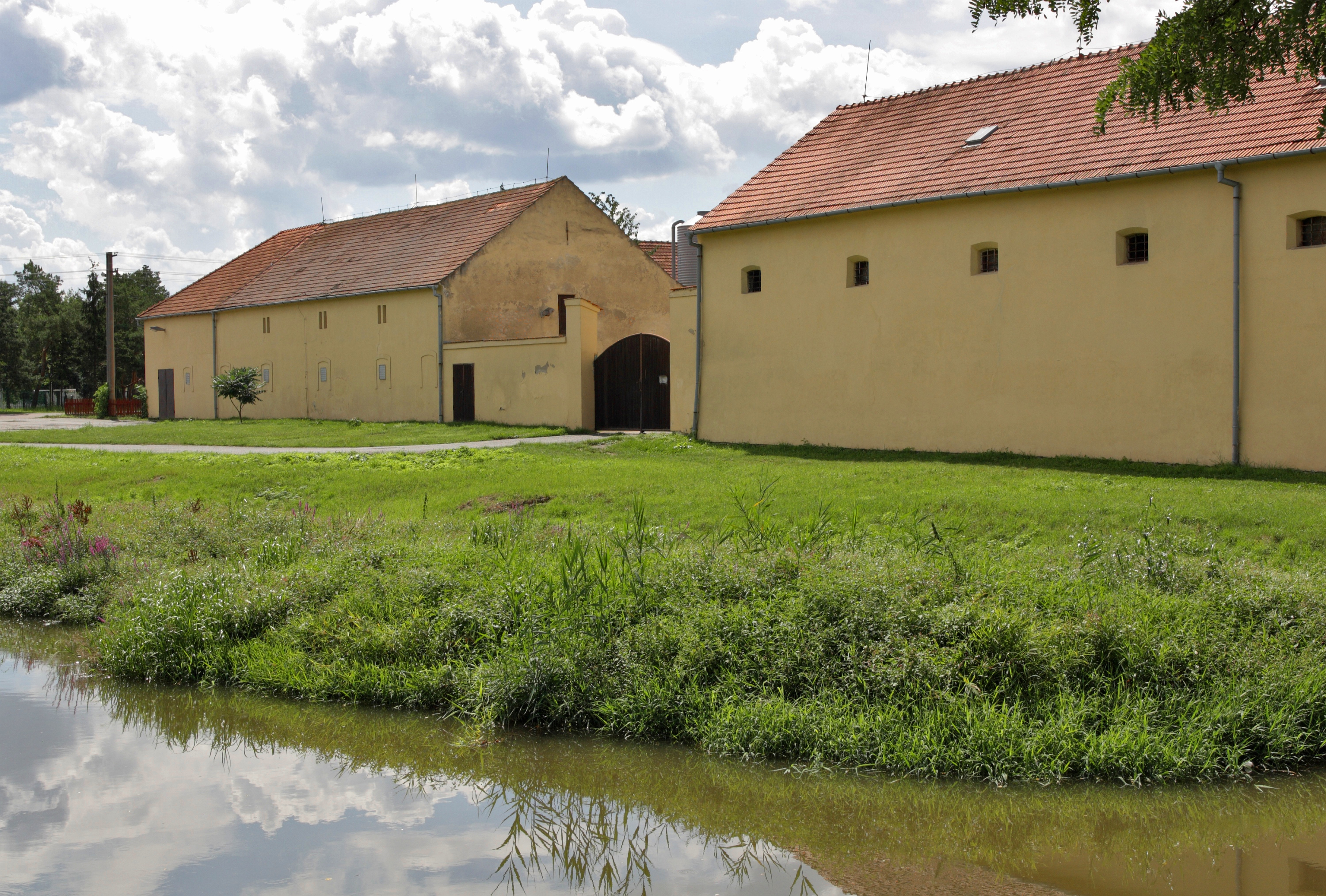 Pohořelice, Velký Dvůr.